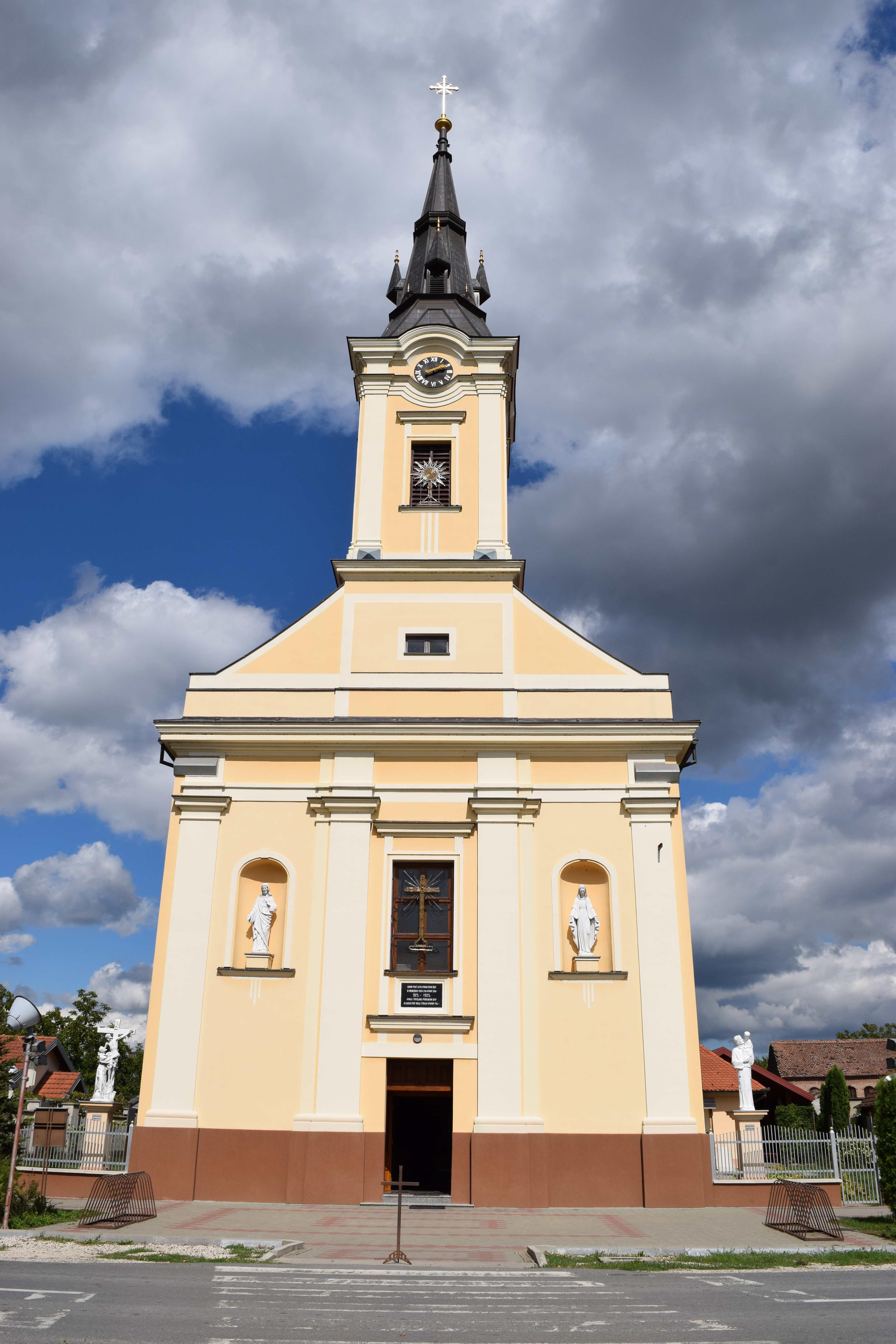 Gradiste